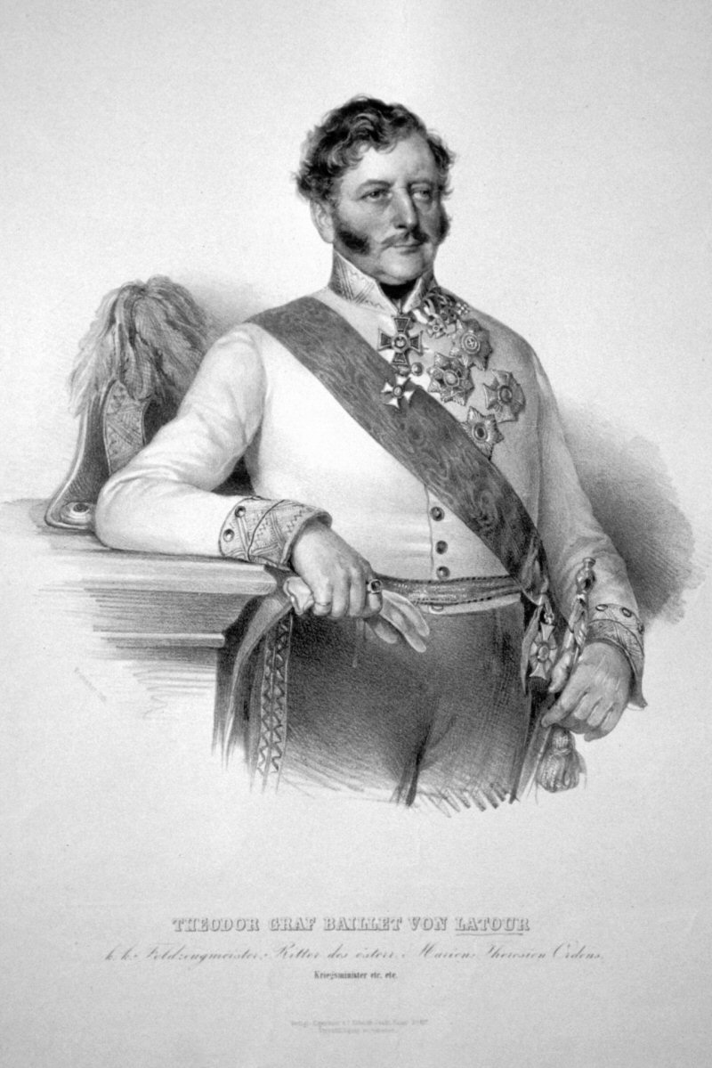 Theodor Graf Baillet de Latour, Lithographie von Josef Kriehuber